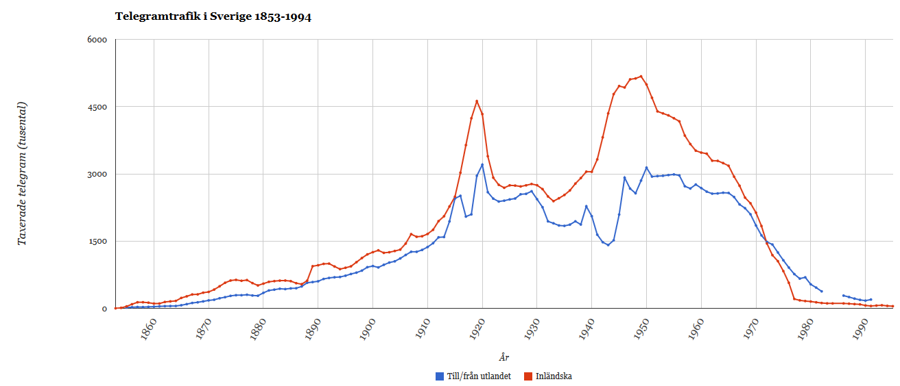 Telegramtrafik i Sverige 1853-1994. I till/från utlandet ingår ej transittrafik, det vill säga telegram som passerade Sverige (främst Stockholms telegrafstation) på väg till annat land. Data på utländska telegram saknas för några år vilket beror på att enbart avgående utländska telegram redovisats för dessa år. Källor: Svenska Telegrafverkets historia, Bd. II, sid. 153, 266, 380, 494; Bd. IV, sid. 270, 288, Bd. VI, sid. 487, 481; Bd. VI, s. 302, 305, Statistisk årsbok, div. årgångar från 1970.